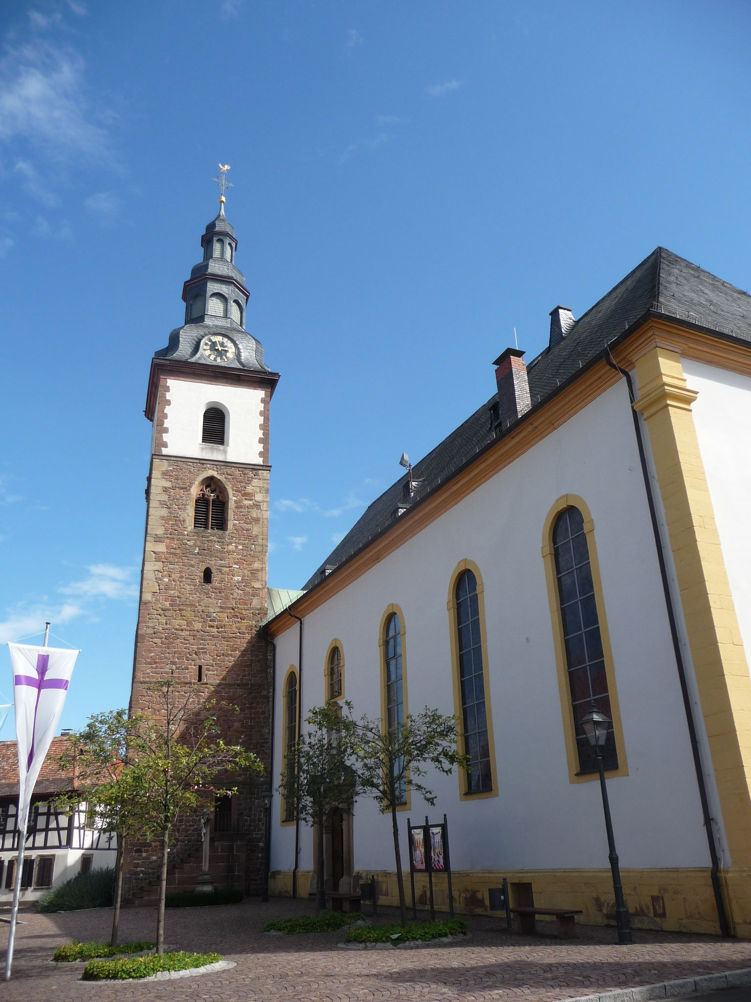 Laurentiuskirche (Dirmstein)